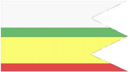 Nová vlajka obce